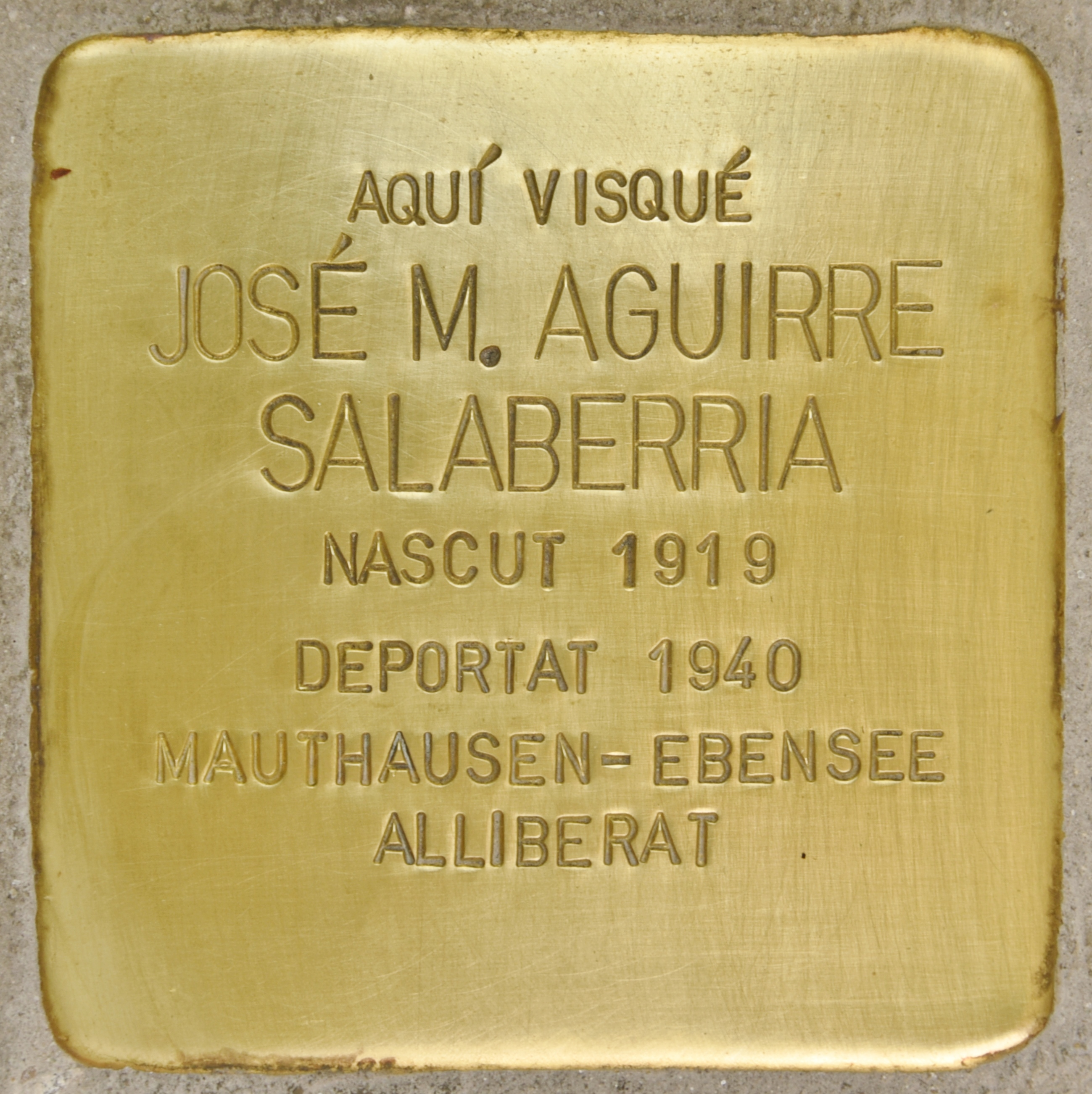 Stolperstein für Jose M. Aguirre Salaberria